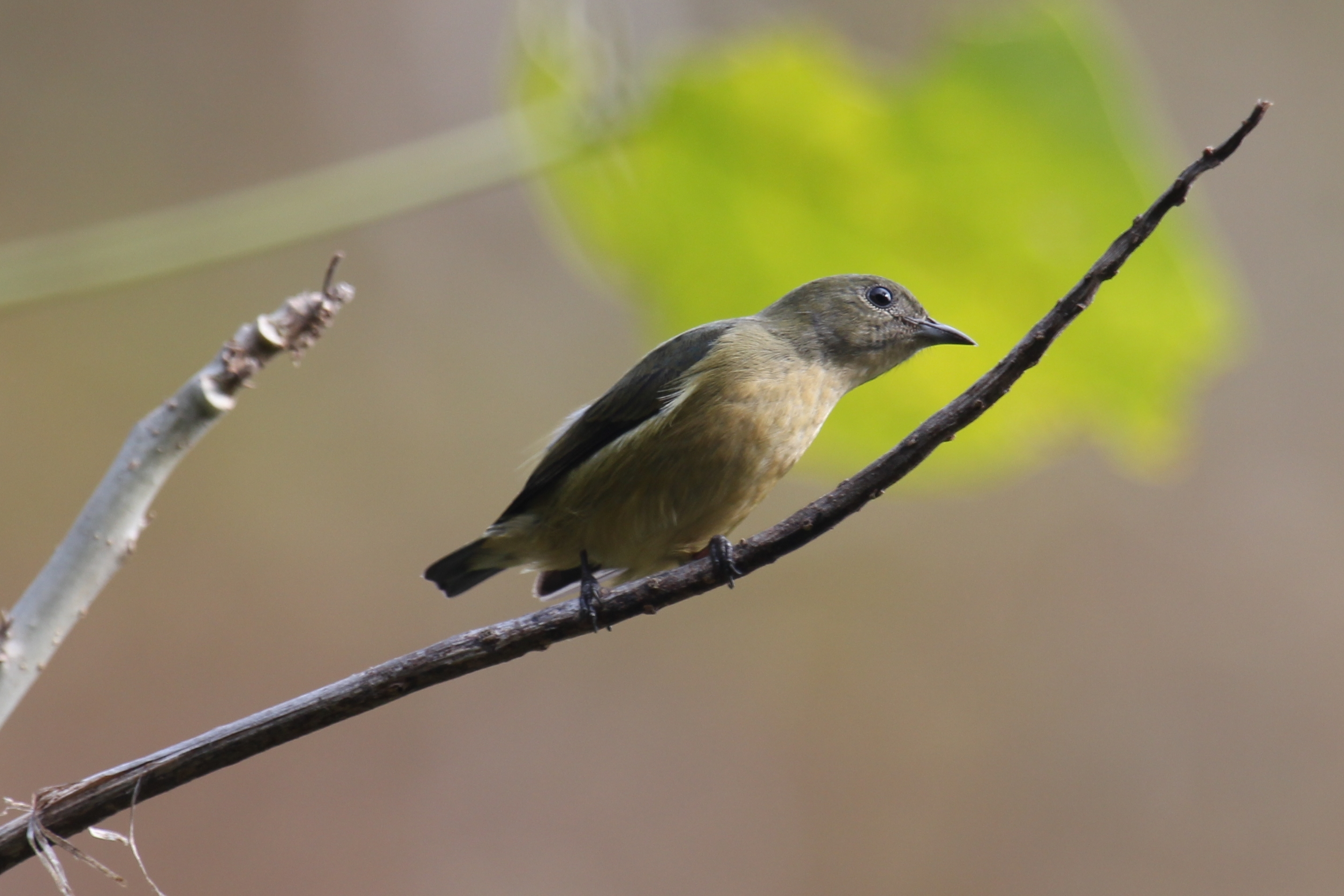 Female. 女红胸啄花鸟福州